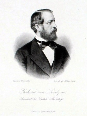 Albert Erdmann Karl Gerhard von Levetzow (1827-1903), deutscher Politiker Brustbild nach rechts. Nach einer Fotografie